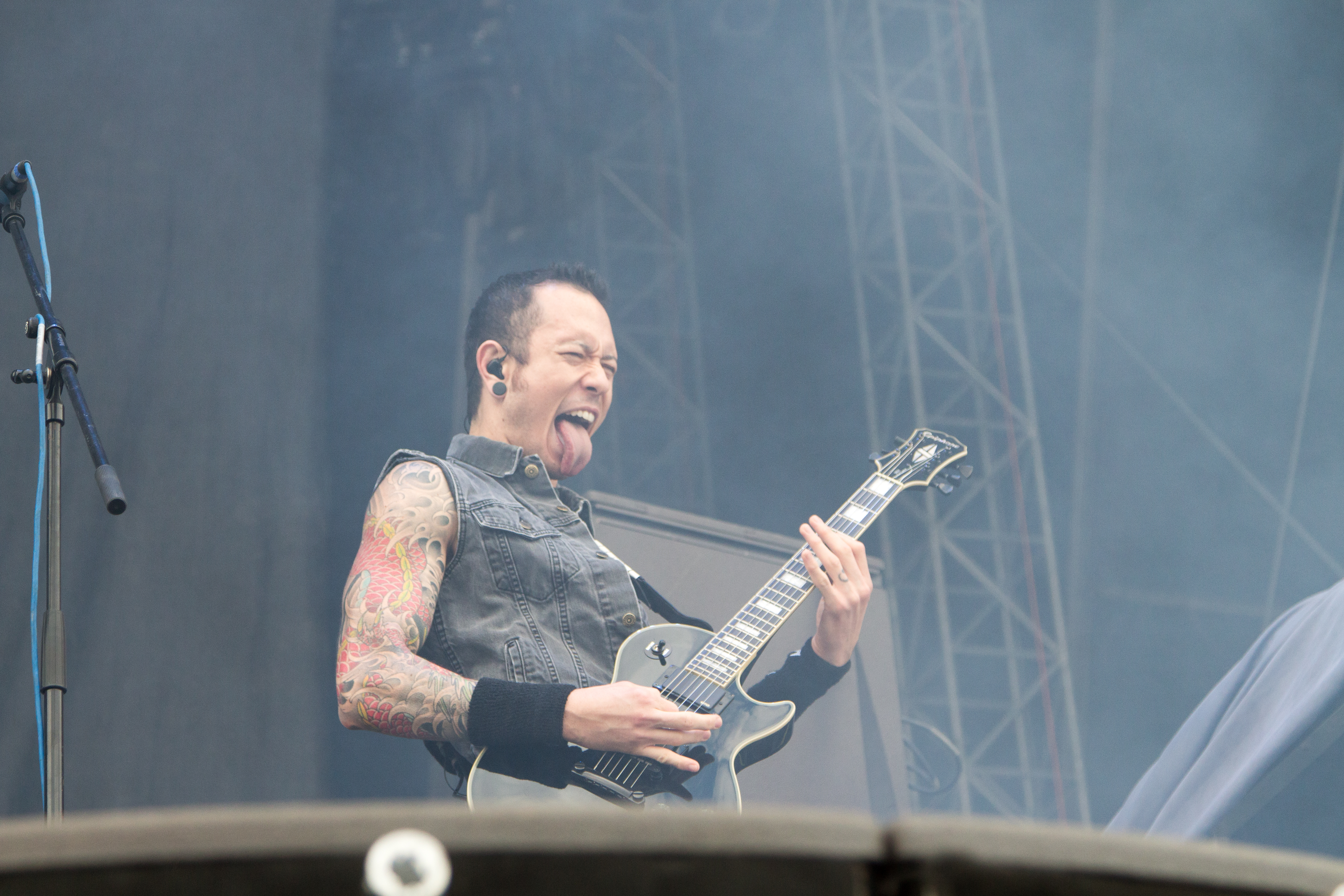 Matt Heafy from Trivium at Nova Rock 2014